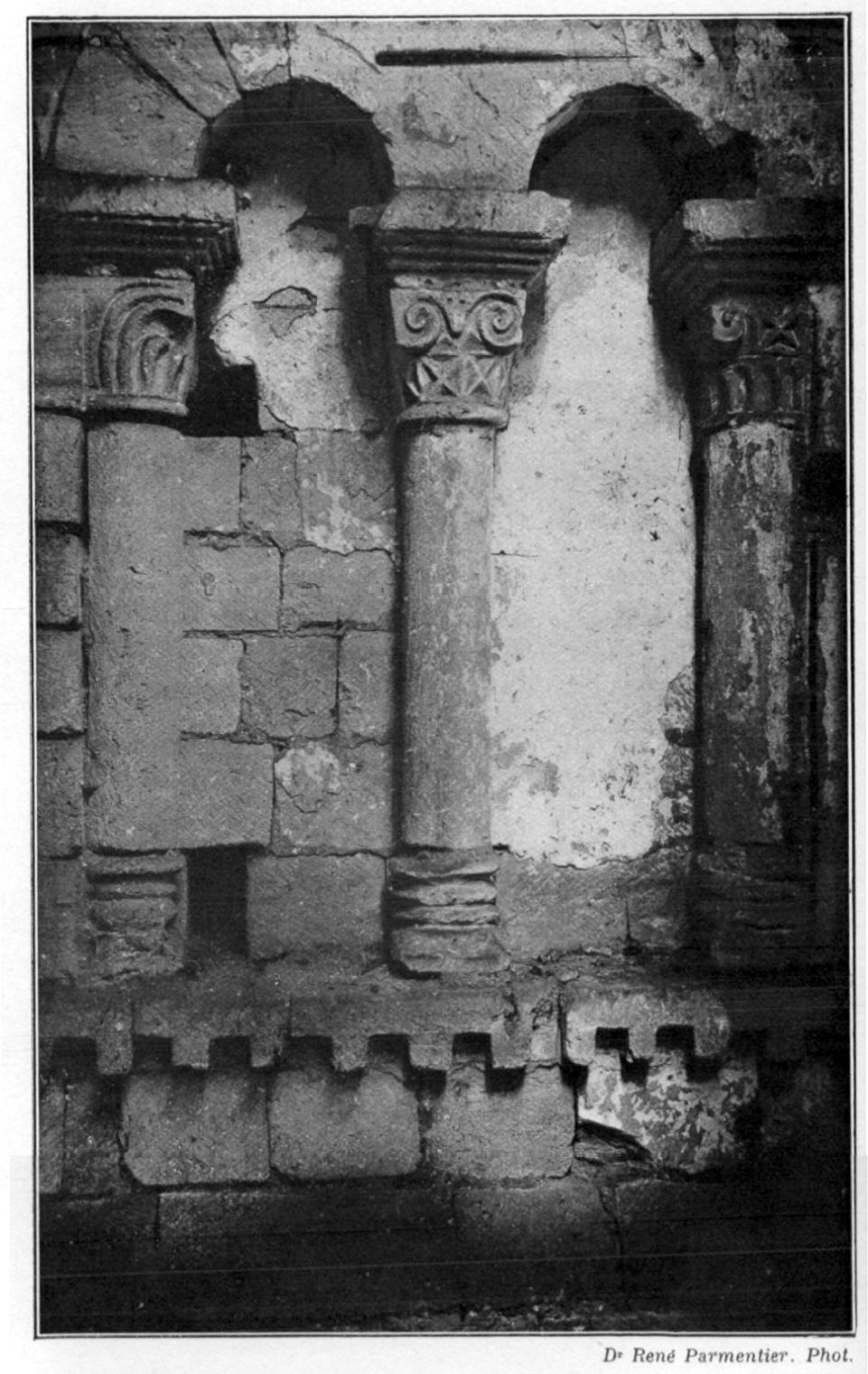 Clocher, 1er étage, côté est, caché par le toit du chœur.